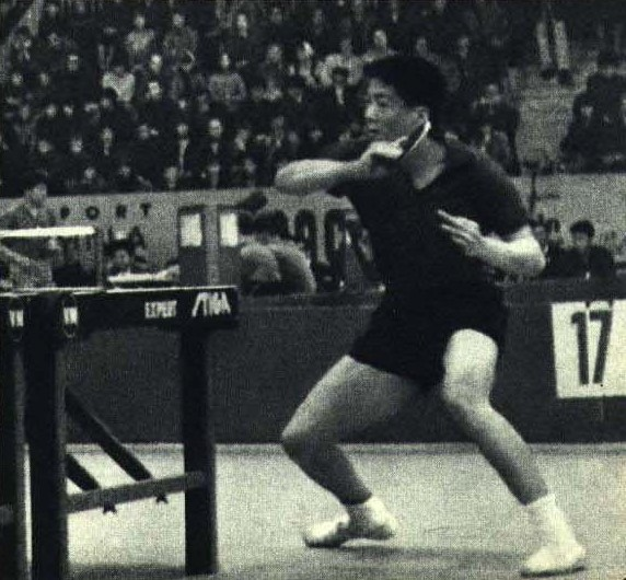 1965-7 1965年 28届世界锦标赛 周兰荪